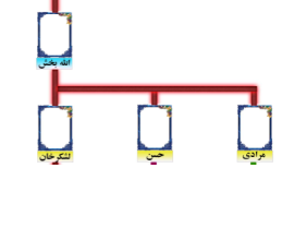 پسران الله بخش